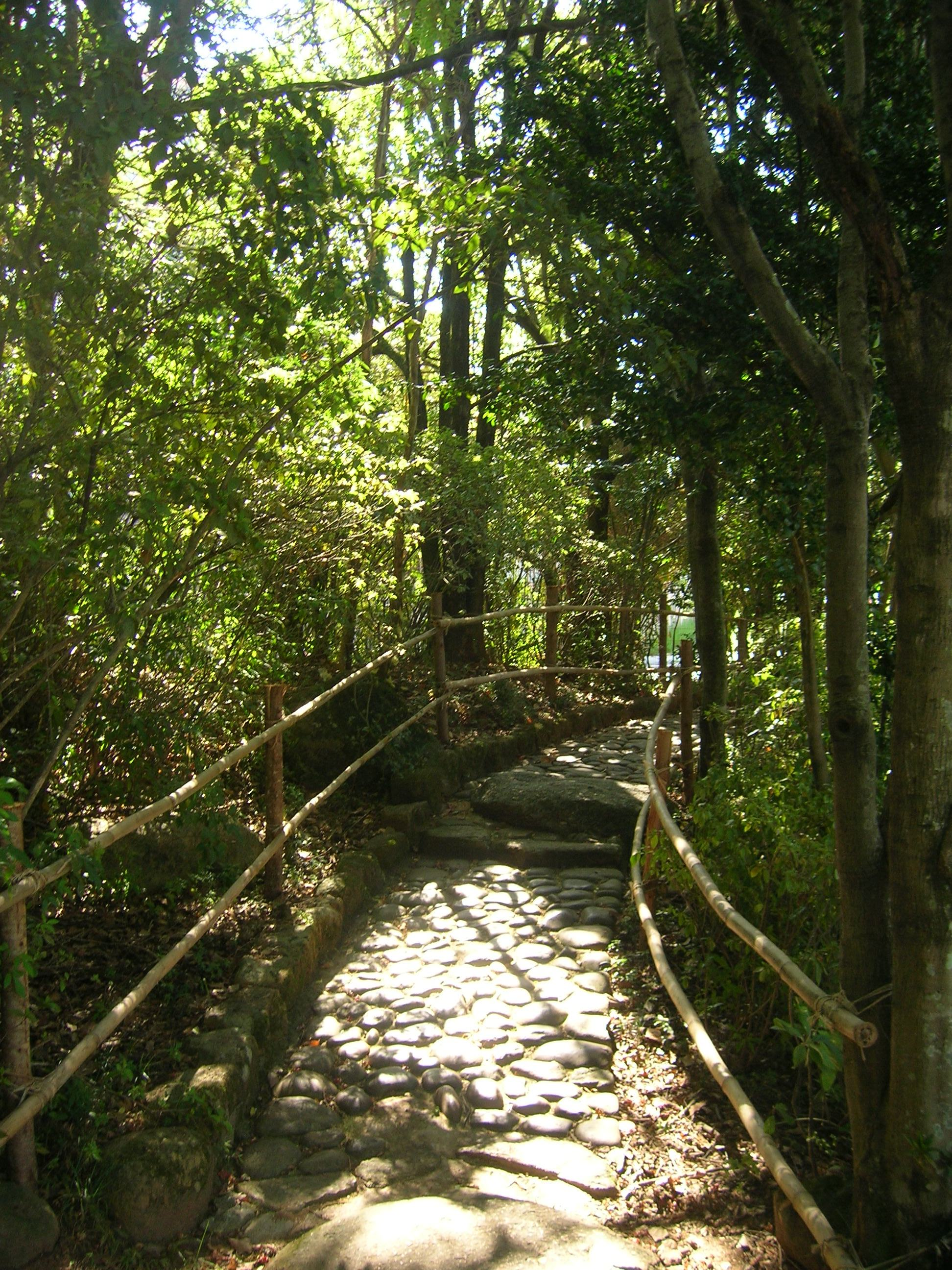 Uma passagem na Praça Shiga, em Porto Alegre, Rio Grande do Sul.